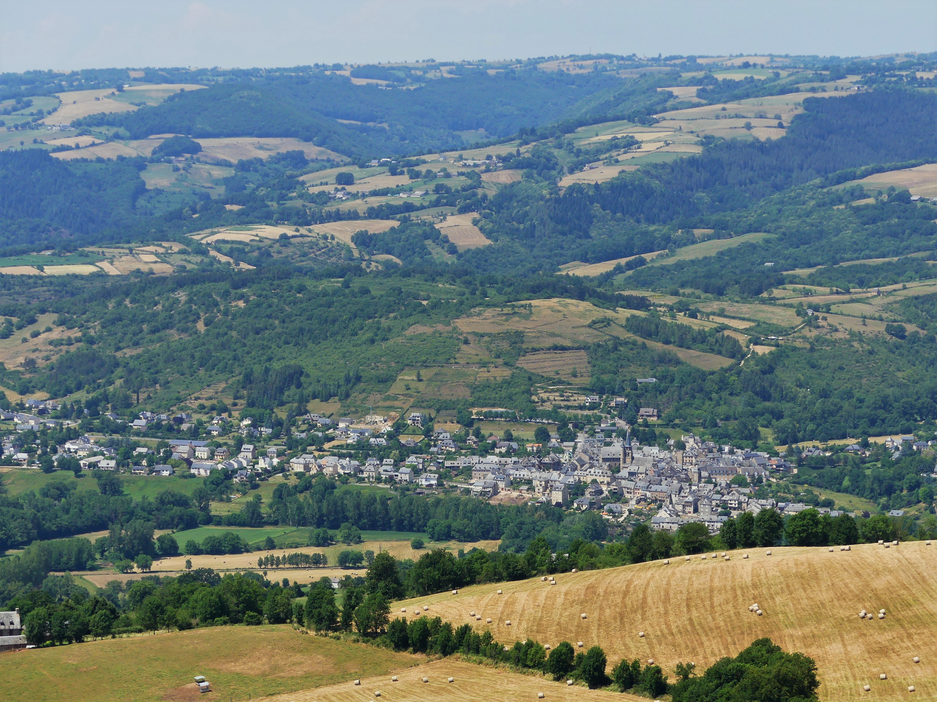 Le village de Saint-Côme-d'Olt ; vue prise depuis Roquelaure (Lassouts, Aveyron, France)